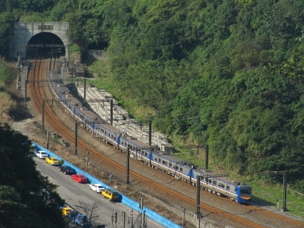 台鐵縱貫線第三代竹仔嶺隧道